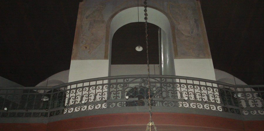 Interior da Capela Nosso Senhor Jesus do Bom Fim, Porto Alegre, Brasil. Coro e remanescentes de pinturas murais